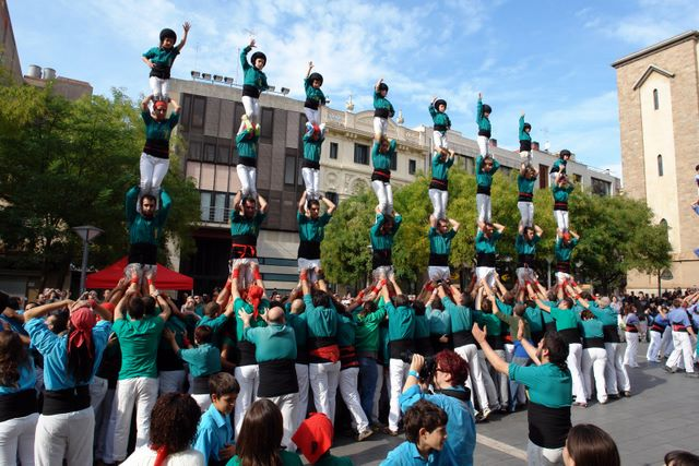 8 pilars de 4 simultanis fets pels Castellers de Sabadell en la XVIII Diada dels Saballuts (Plaça de Sant Roc, Sabadell, 23 d'octubre del 2011). Fins al moment, aquest és el màxim de pilars de 4 fets simultàniament pels Castellers de Sabadell.